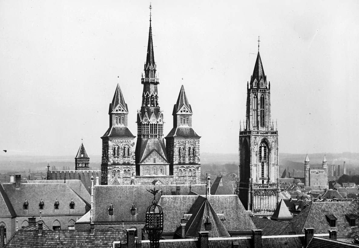 Maastricht: kerktorens in 1937, o.a. westwerktorens Sint-Servaas en Sint-Janstoren. Op de voorgrond de kloostergebouwen van de Zusters Onder de Bogen met o.a. de neogotische kloosterkerk.